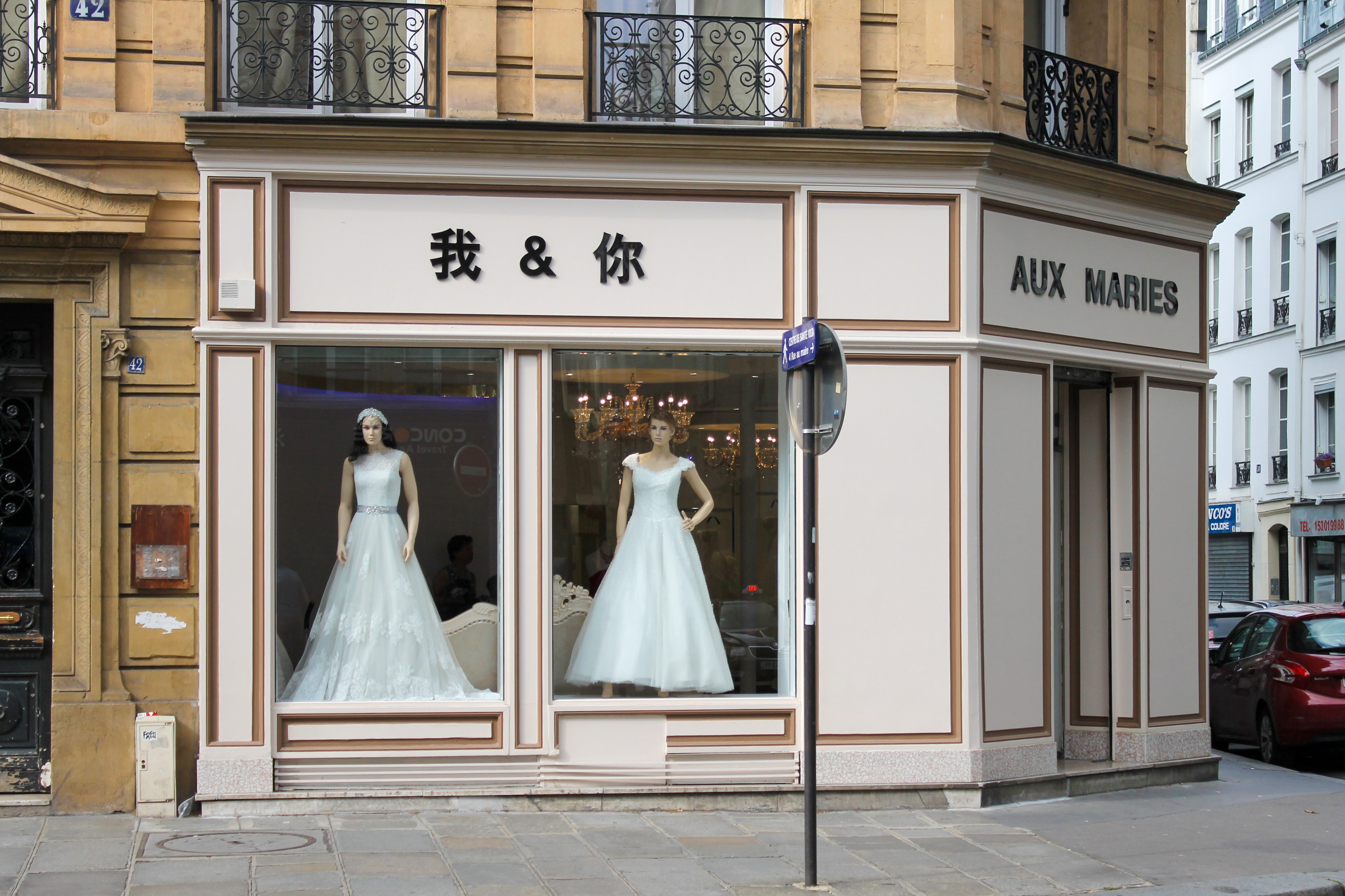 "我 & 你 / AUX MARIES", 42 rue Réaumur, 75003 Paris, France.